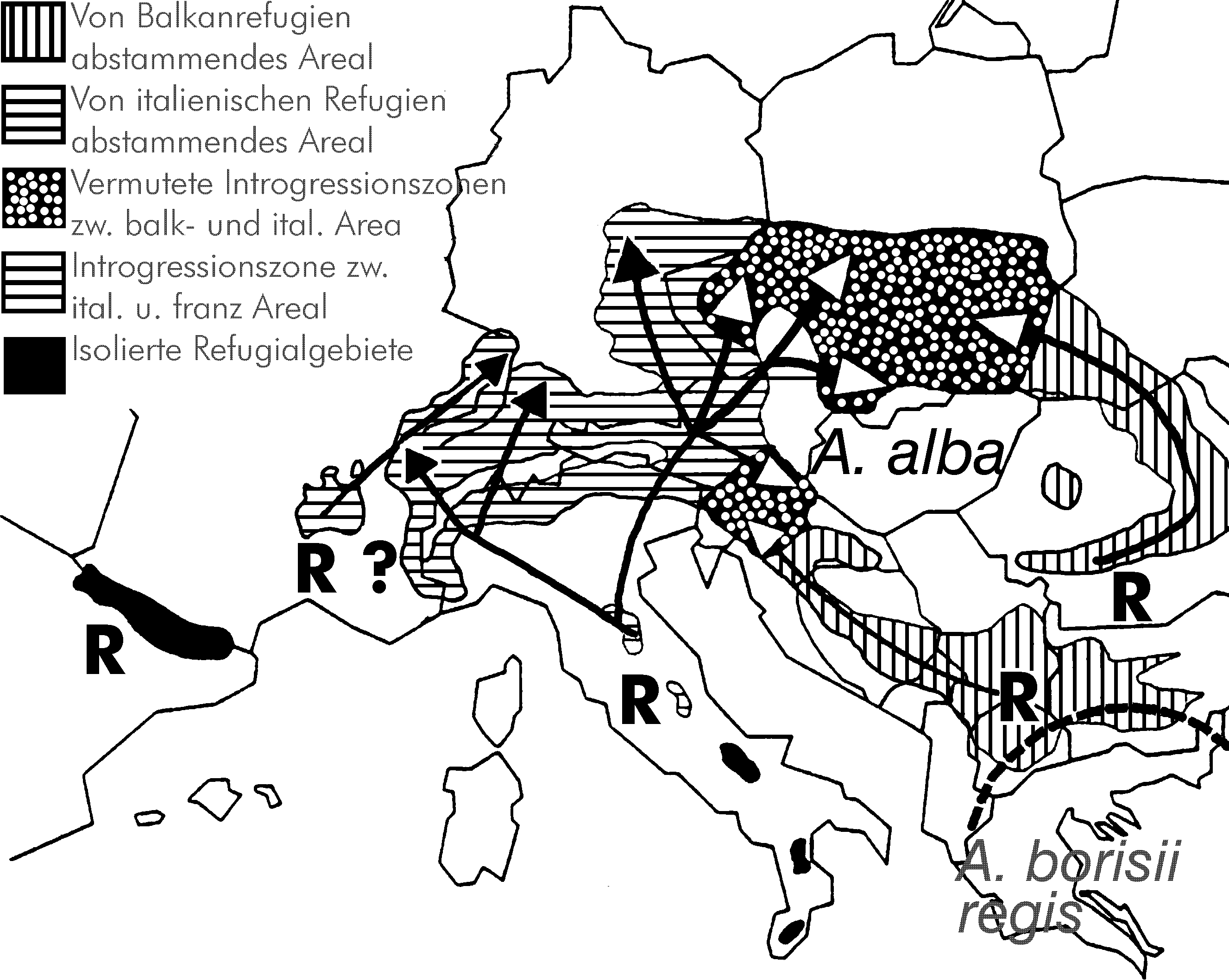 Migration und Verbreitung von Abies in Europa; Konnert und Bergmann 1992, Migration der Weißtanne, verändert